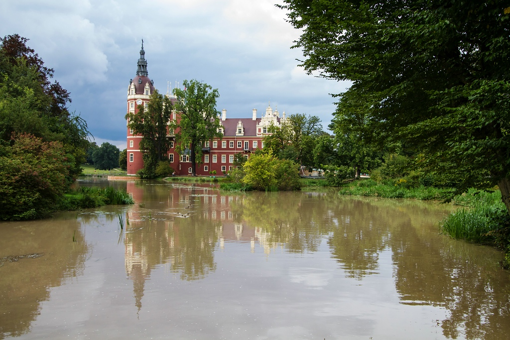 Fürst-Pückler-Park Bad Muskau: Blick auf das Neue Schloss